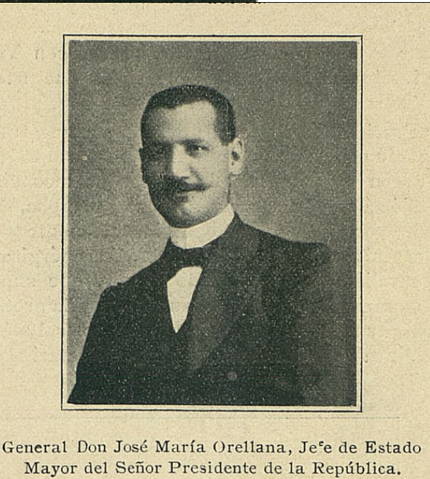 General José María Orellana en 1907, cuando era jefe del Estado Mayor del president Manuel Estrada Cabrera.